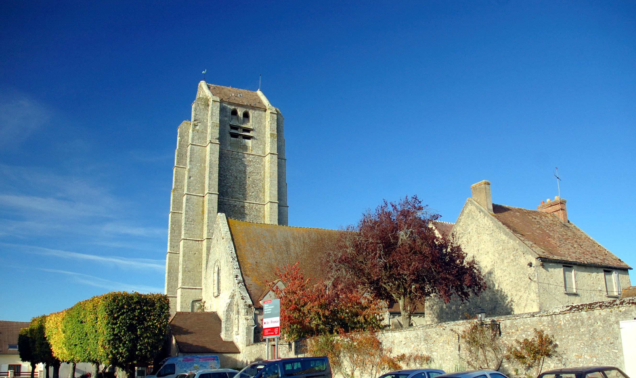 Eglise-Saint-Léonard (Les Granges-le-Roi, Essonne, Île-de-France, France).